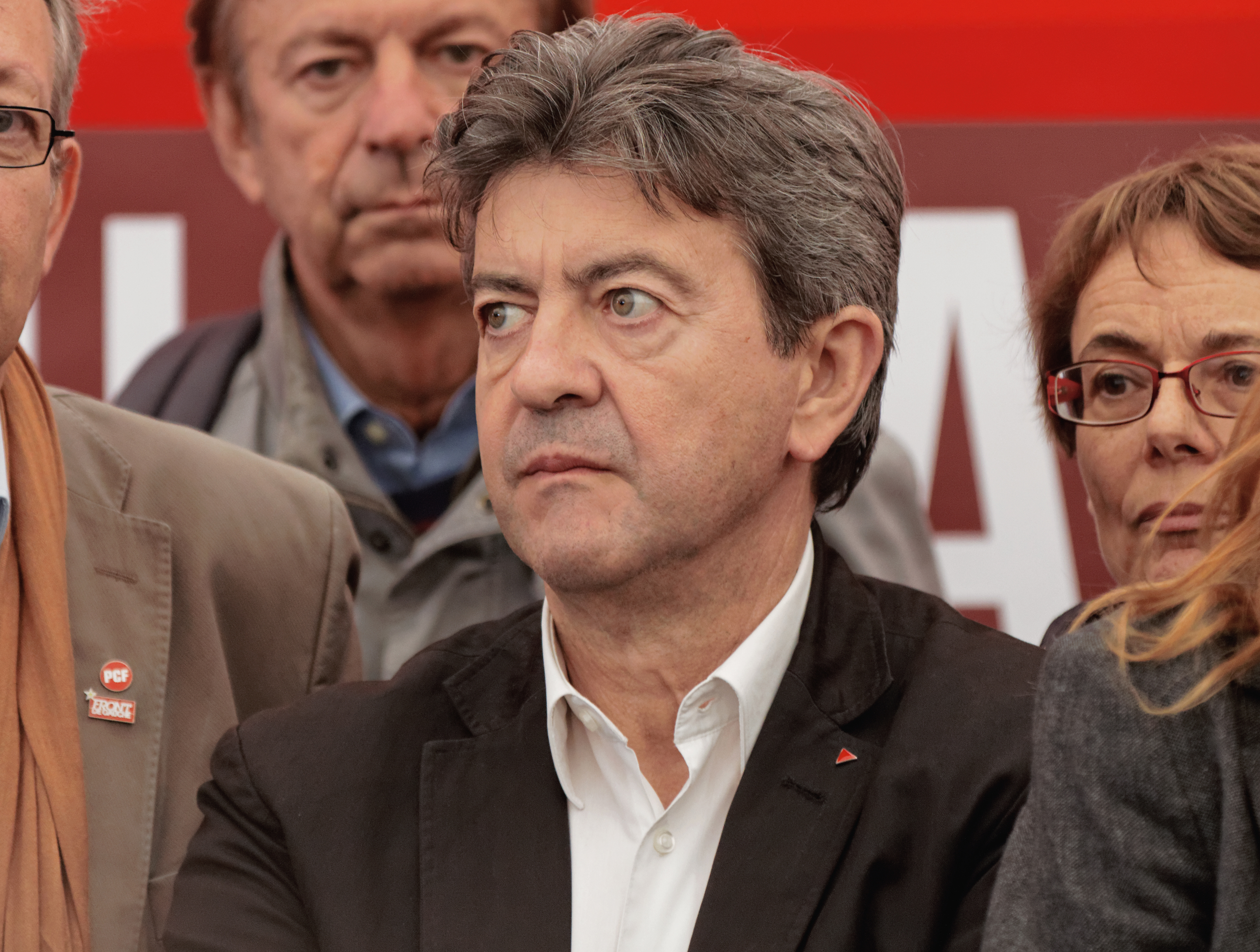 Stand du Front de Gauche lors de la fête de l'Humanité 2012.